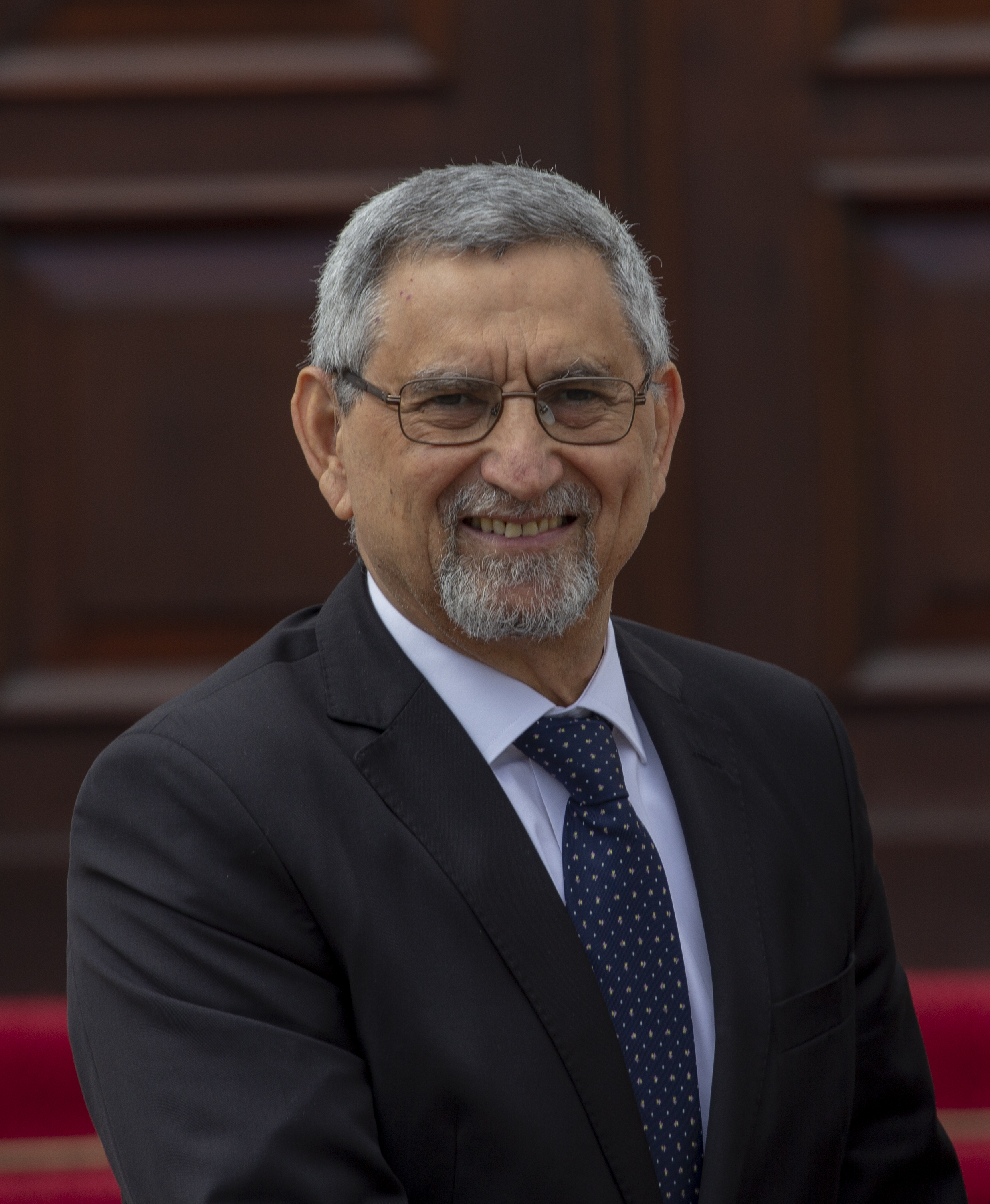 Empfang des Praesidenten der Republik Cabo Verde Jorge Carlos Fonseca bei Bundespraesident Frank-Walter Steinmeier im Schloss Bellevue.